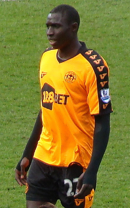 Mohamed Diamé, Fulham V Wigan